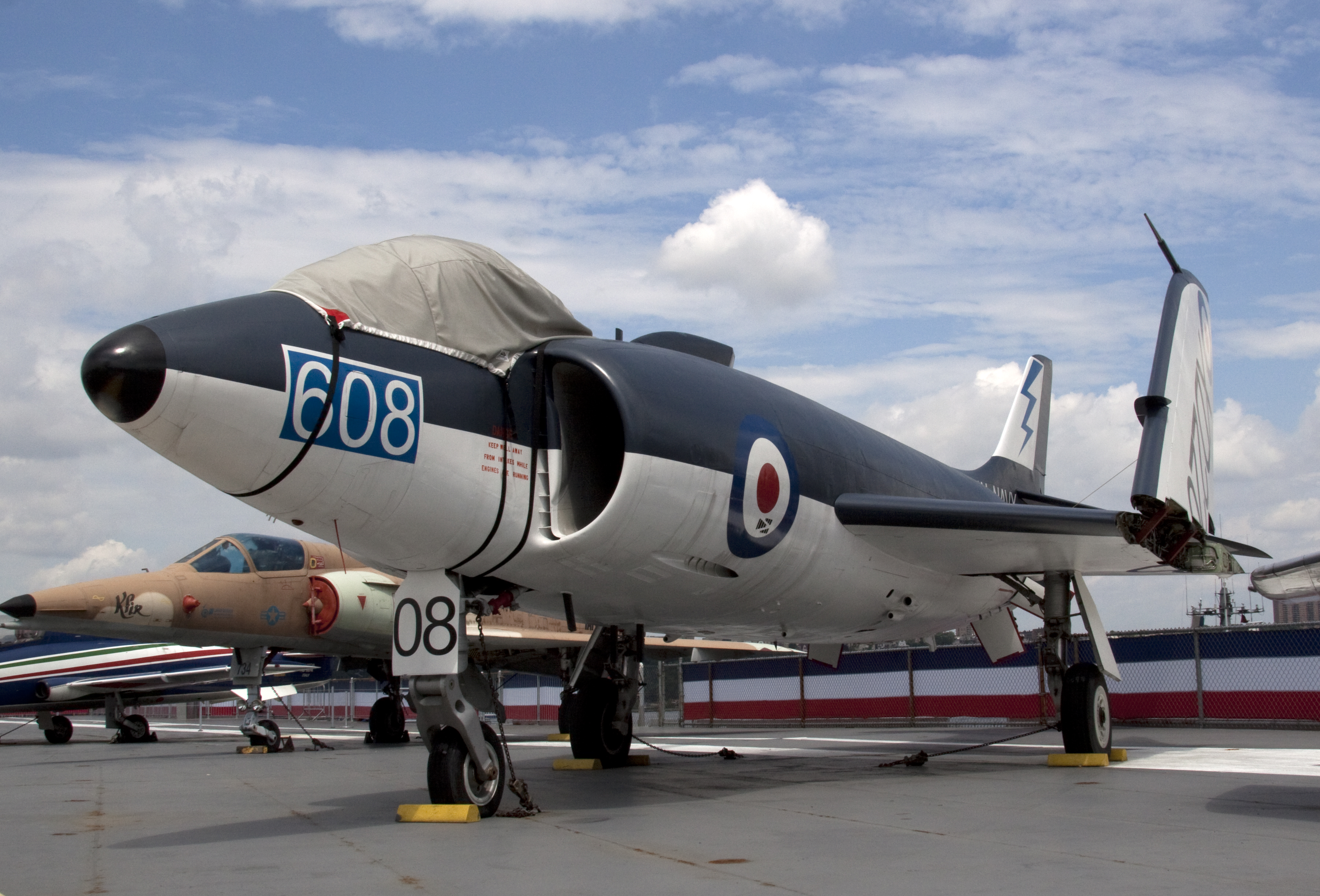 Supermarine F1 Scimitar 1